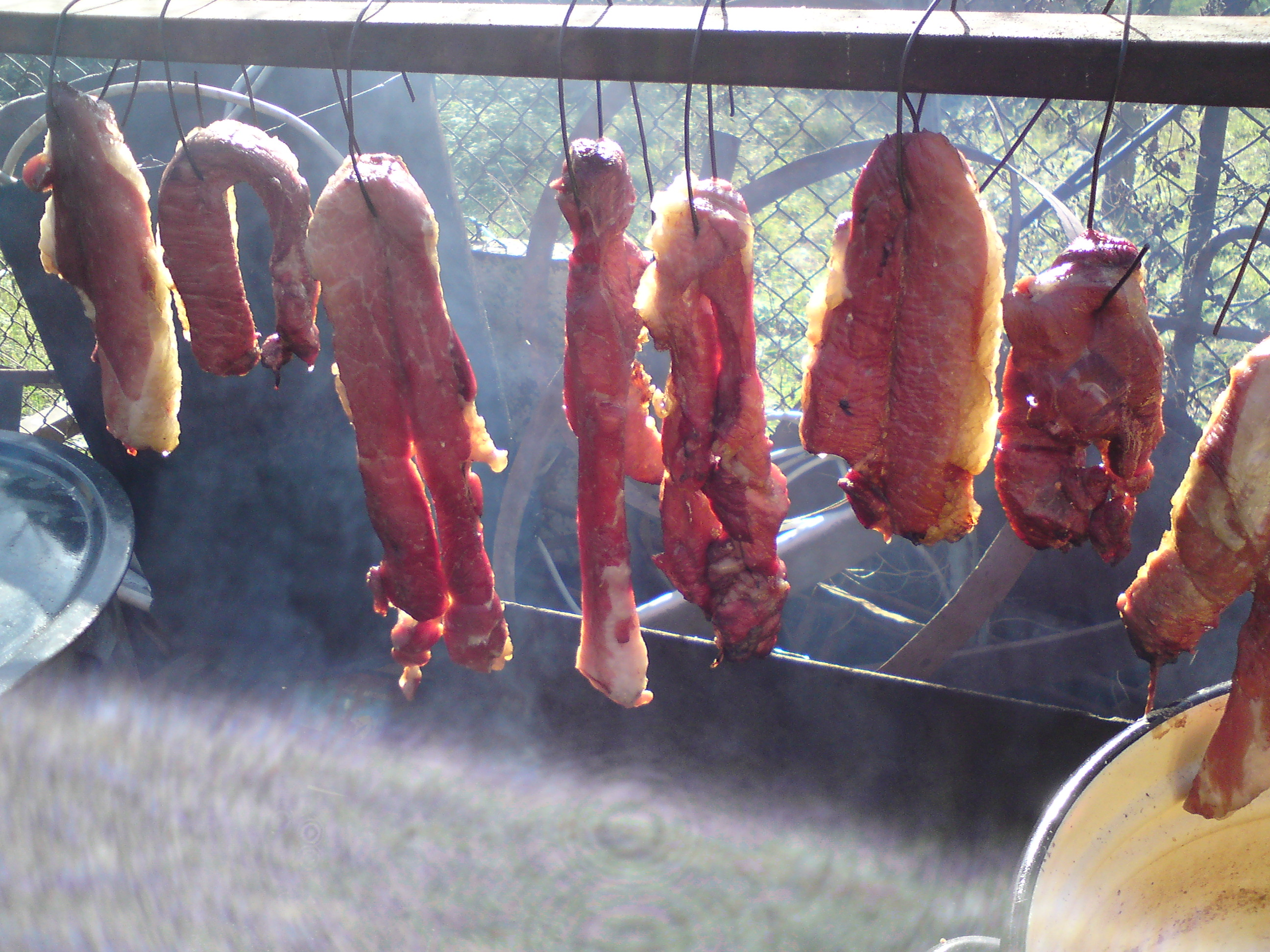 Печене на месо